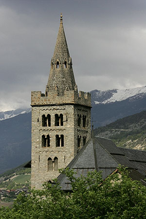 Gotische St.Stephanskirche in Leuk-Stadt